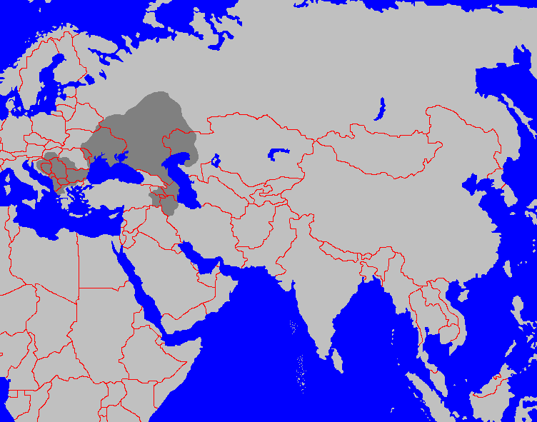 Das Großbulgarische Reich, dass das Erbe der Altyn Oba Horde antrat und damit im Zusammenhang mit dem europäischen Hunnentum zusammenhängt. / Darstellungskarte zeigt das Großbulgarische Reich in seiner größten Ausdehnung.